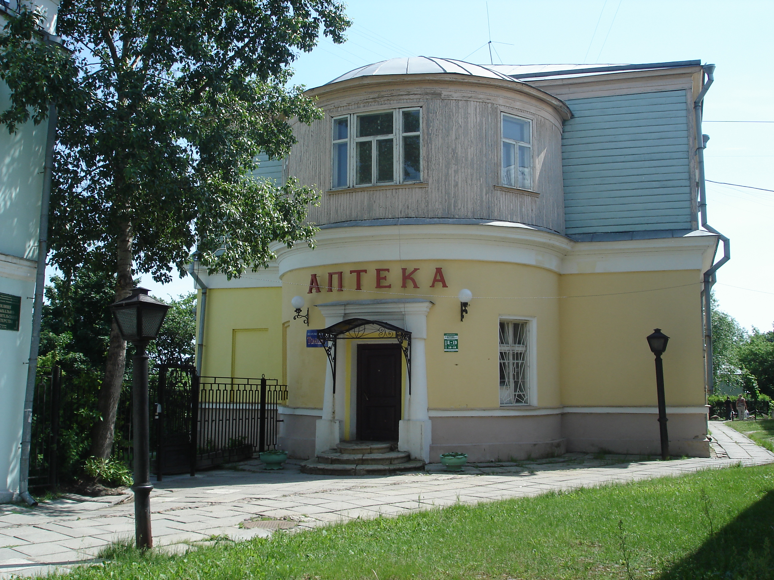 старая аптека 1805г.